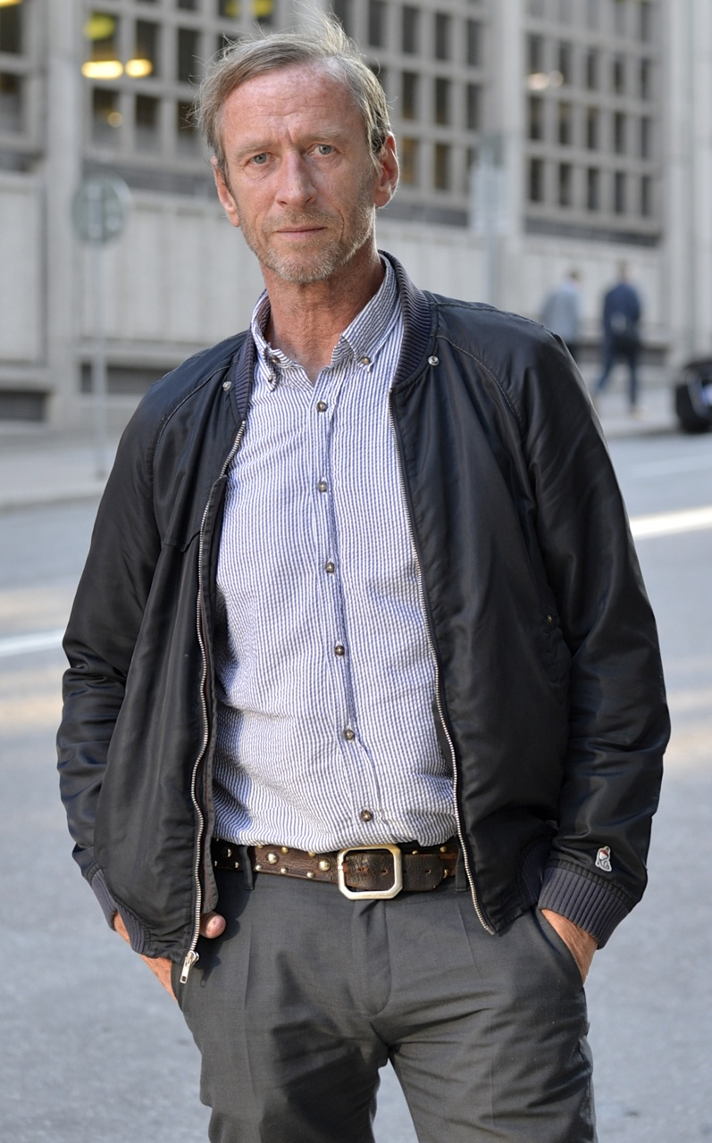 Per Holknekt på Mäster Samuelsgatan i Stockholm den 4 september 2014.